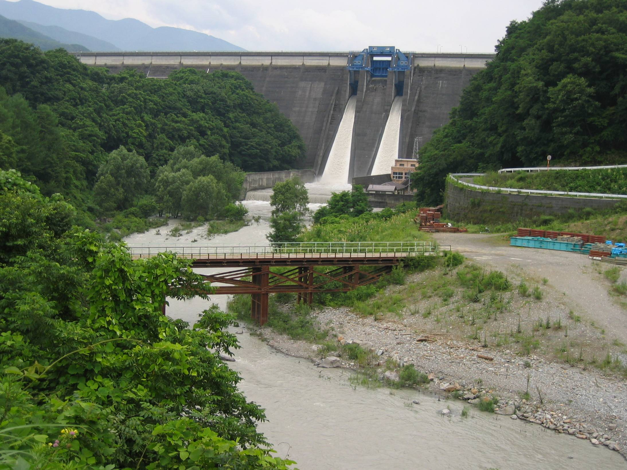 Miwa dam (美和ダム) is a dam in Nagano, Japan.